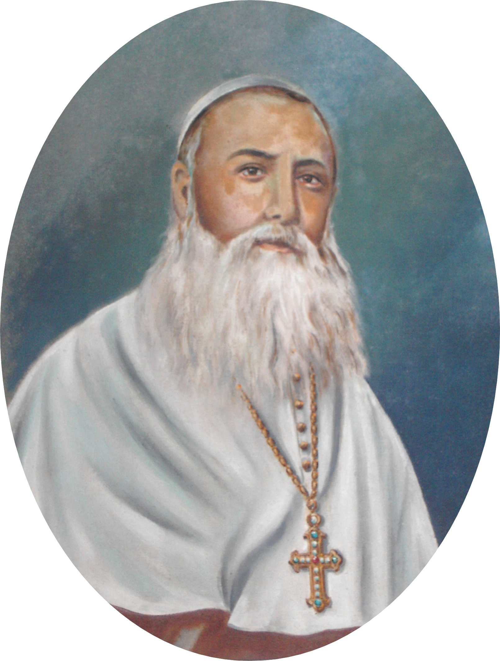 Bischof Marie Ephrem Garrelon (+ 1873), Ölportrait (1880) im Bischofshaus von Quilon, Indien